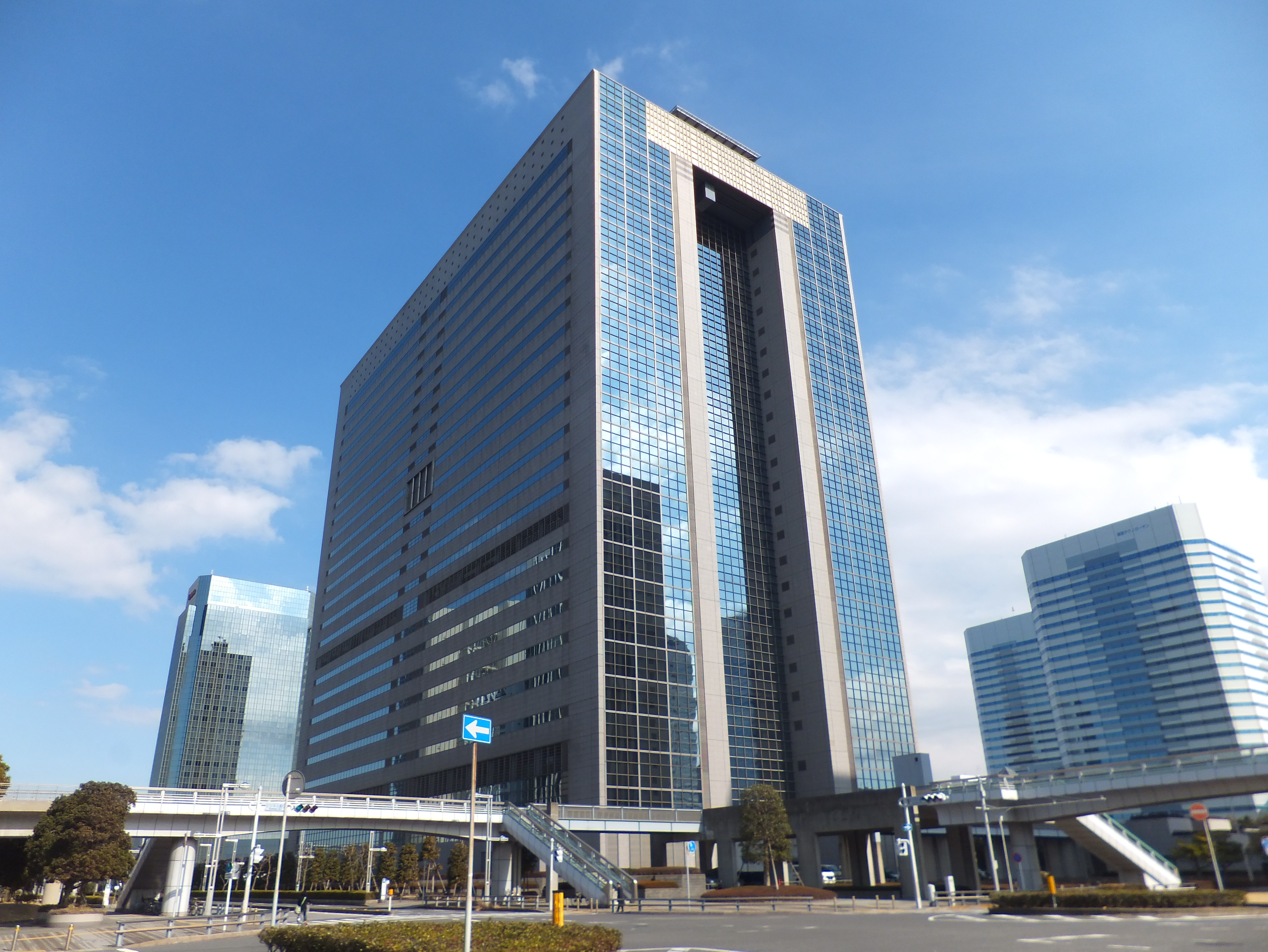 NTT幕張ビル